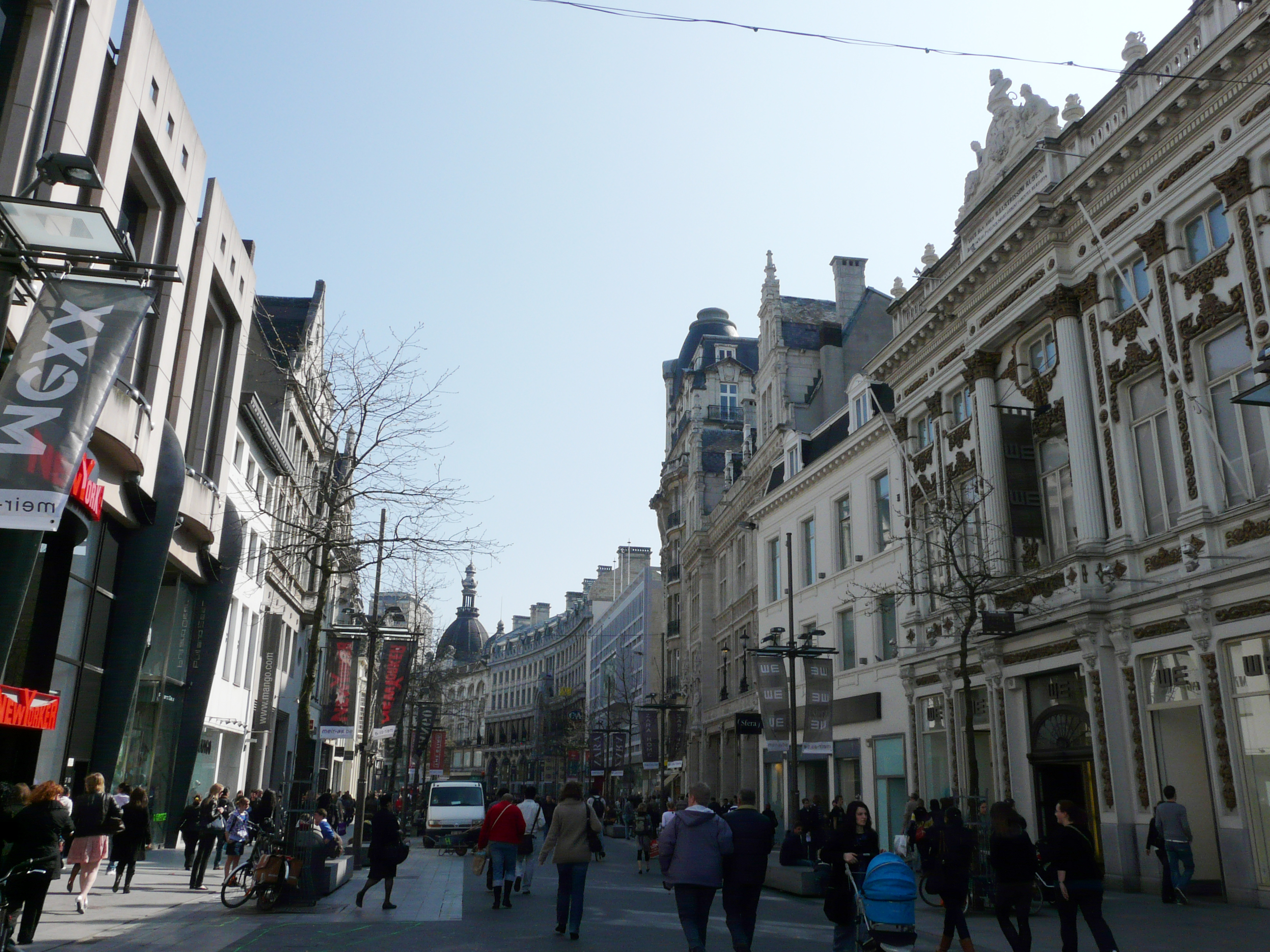 Meir Antwerpen